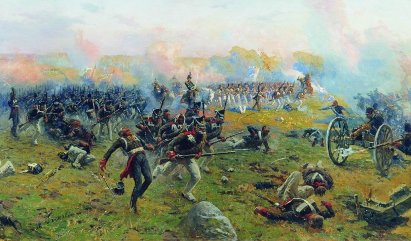 Лейб-гвардии Гренадерский полк в сражении при Бородине 26 августа 1812 года. 1912-1913 Холст, масло. 108 x 184 см Центральный военно-исторический музей артиллерии, инженерных войск и войск связи